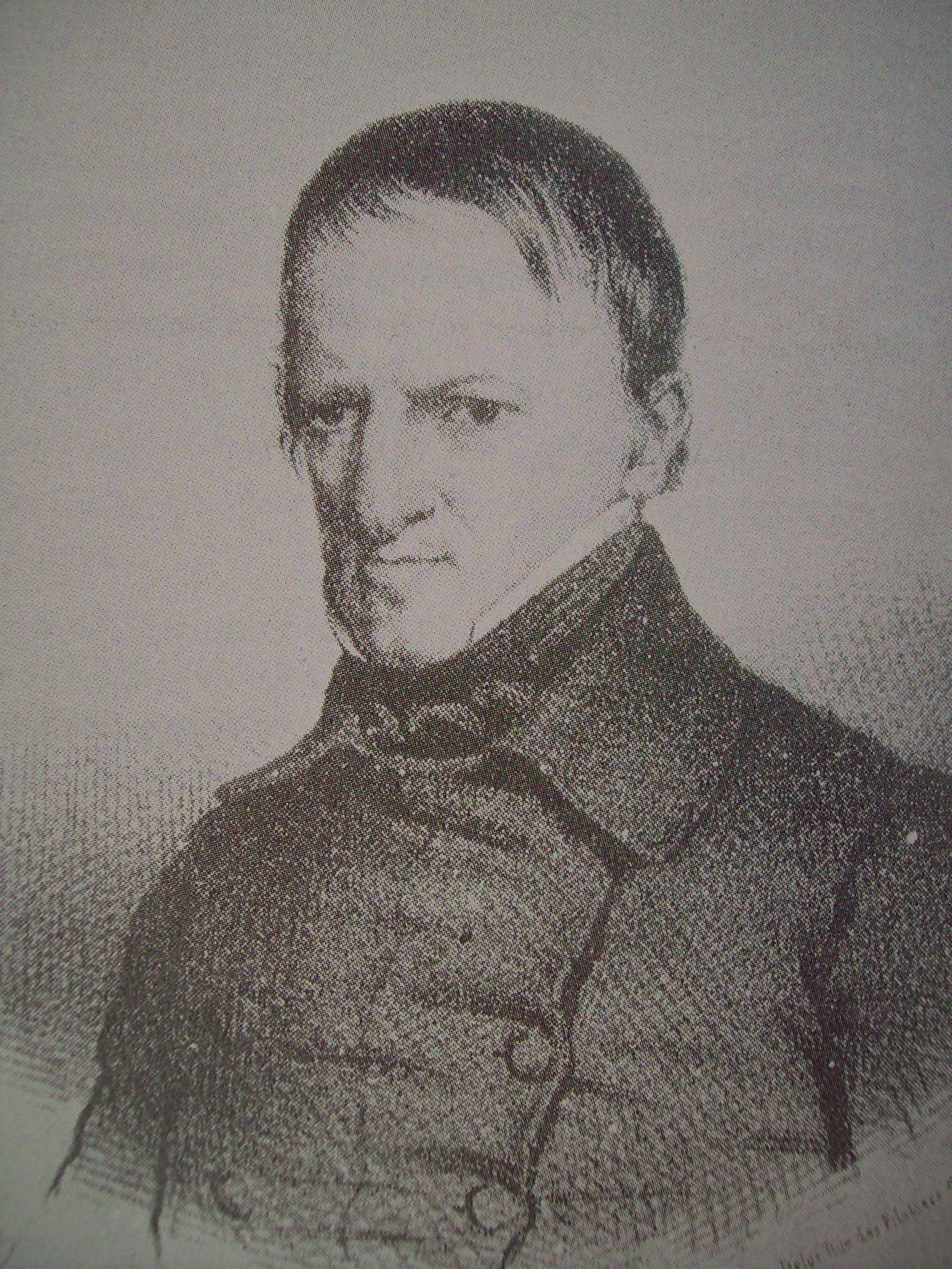 Litografía de Eugenio de Aviraneta publicada en 1841